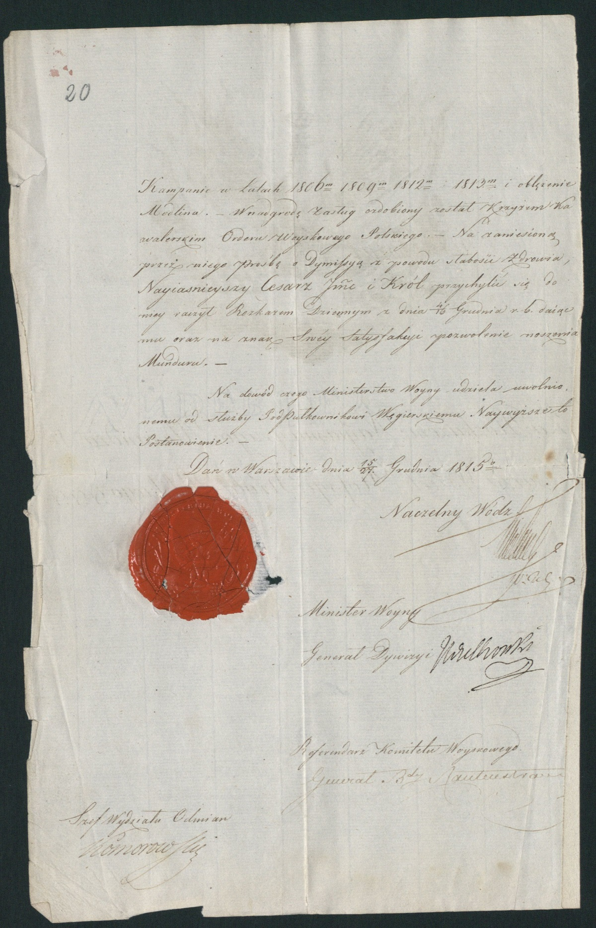 strona 2